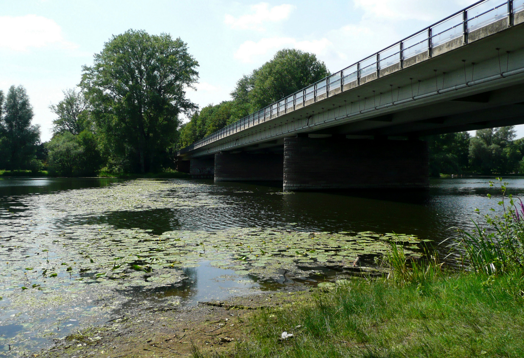 Südschnellweg in Ricklinger Kiesteichen (Hannover)